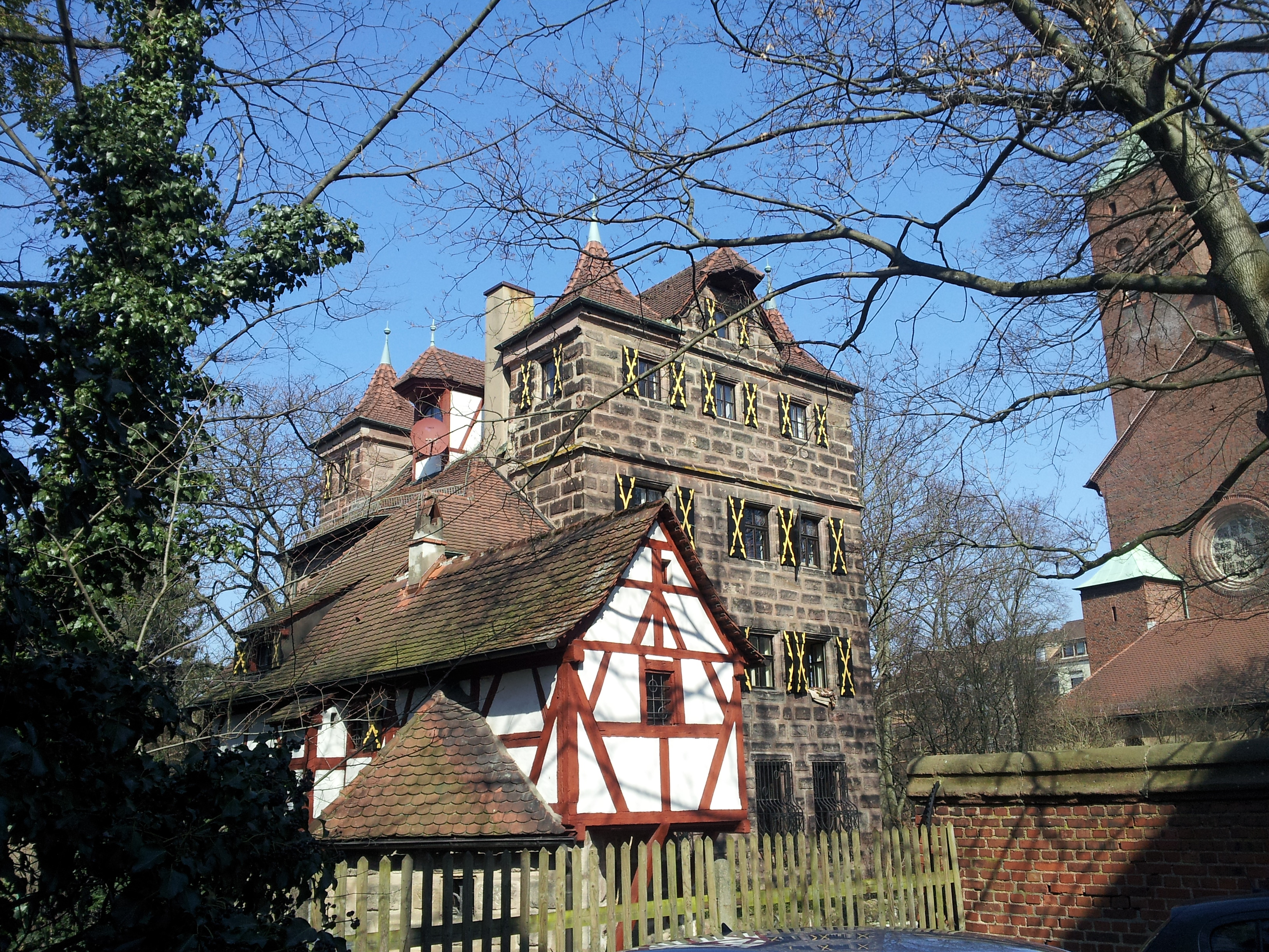 Wirthstraße 76 - Ehem. Herrensitz Lichtenhof sog. Petzenschloss - rechteckiger Sandsteinbau, Satteldach mit vier quadratischen Eckerkern mit Spitzhelm, im Kern 1578, Umbau von Rolf (Rudolph) Behringer 1910/11 - Grabeneinfassung und Zwingeranlage - Teile der ehemaligen Garteneinfriedung; sämtlich im Kern 1578 - D-5-64-000-2172